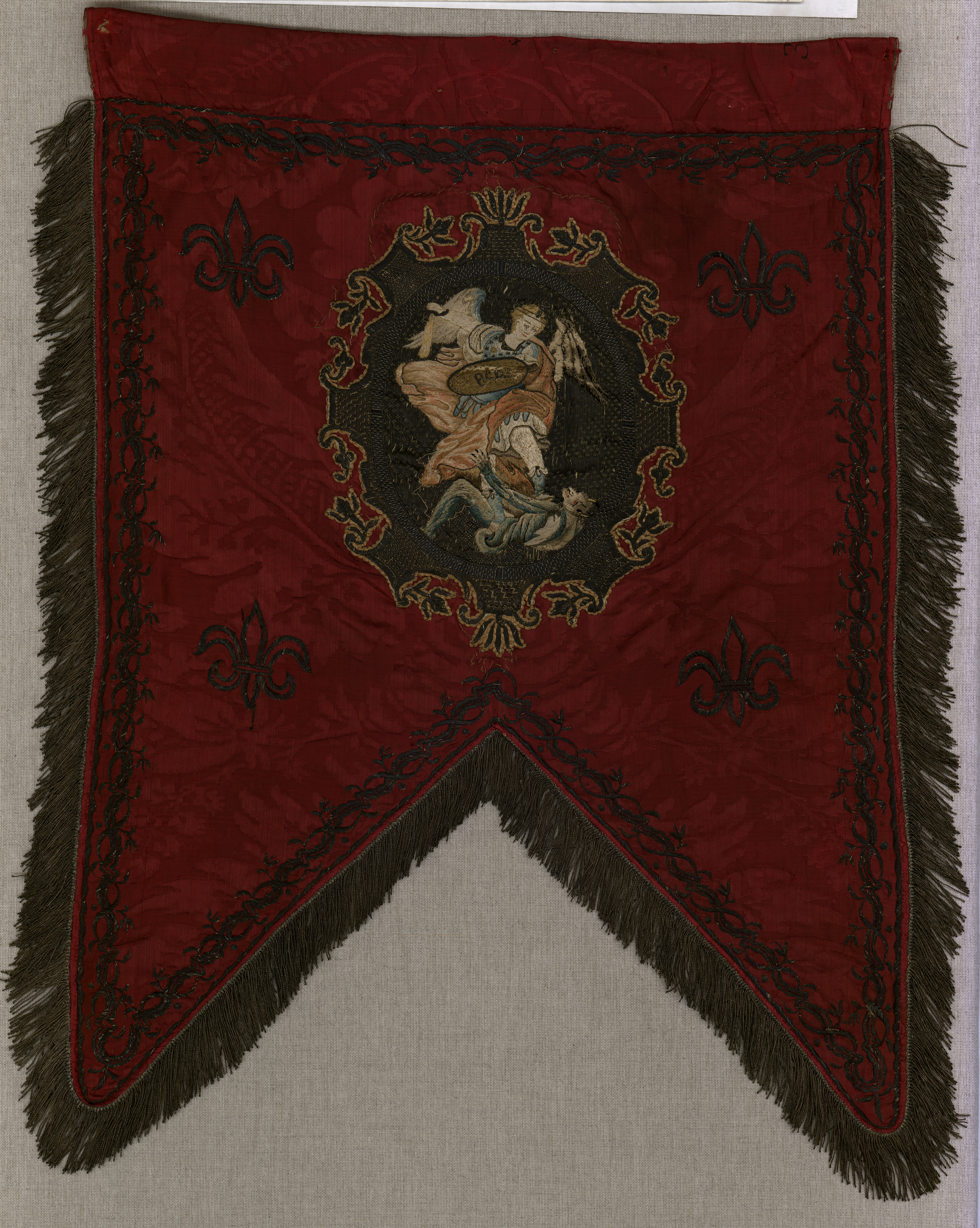 Guión del Regimiento de Dragones de Lusitania (1813-1815)